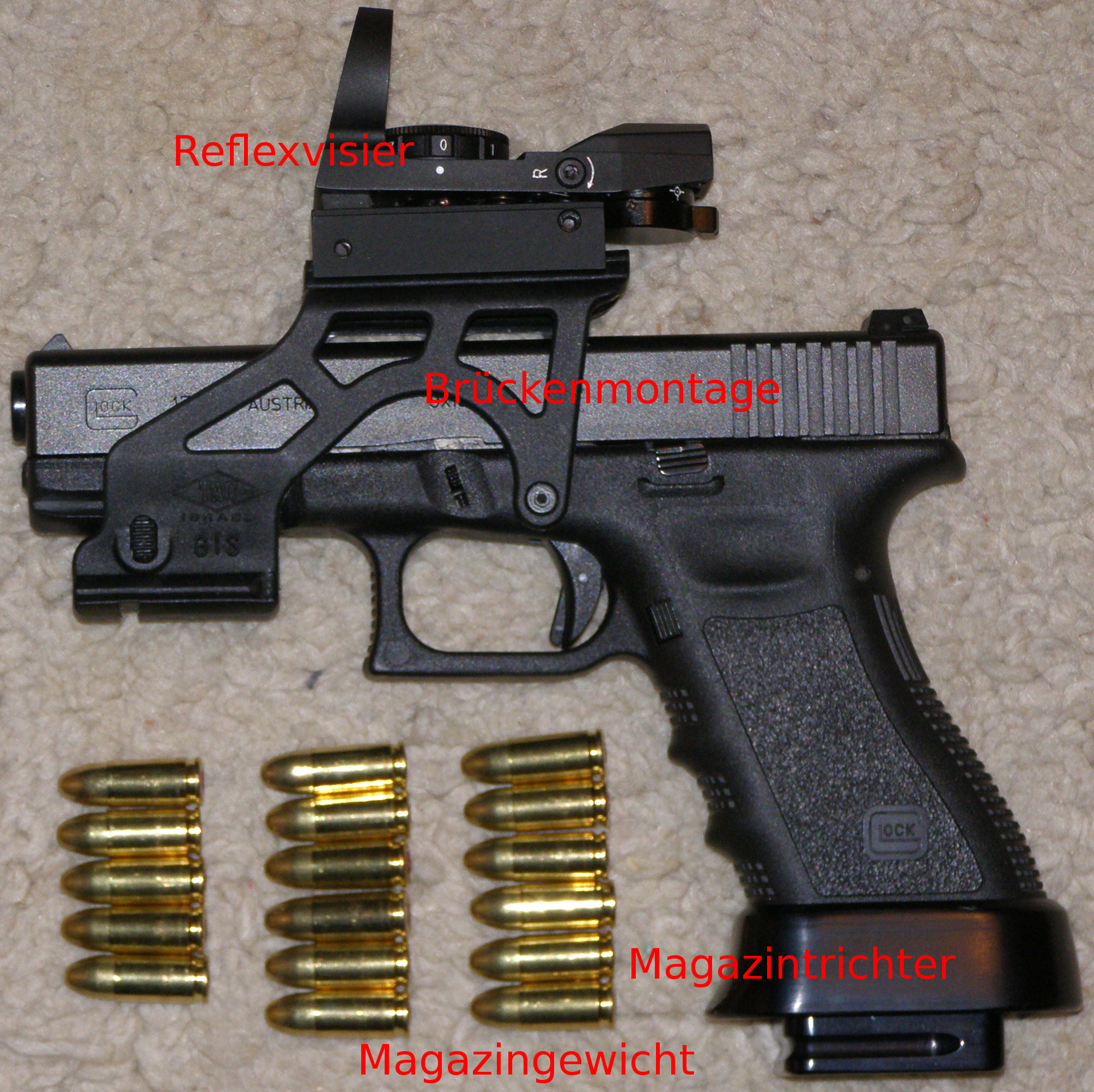 Glock 17 mit Anbauteilen: Magazingewicht, Magazintrichter, Brückenmontage, Reflexvisier